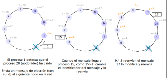 Primera parte del ejemplo gráfico de un algoritmo de elección de líder en anillo.